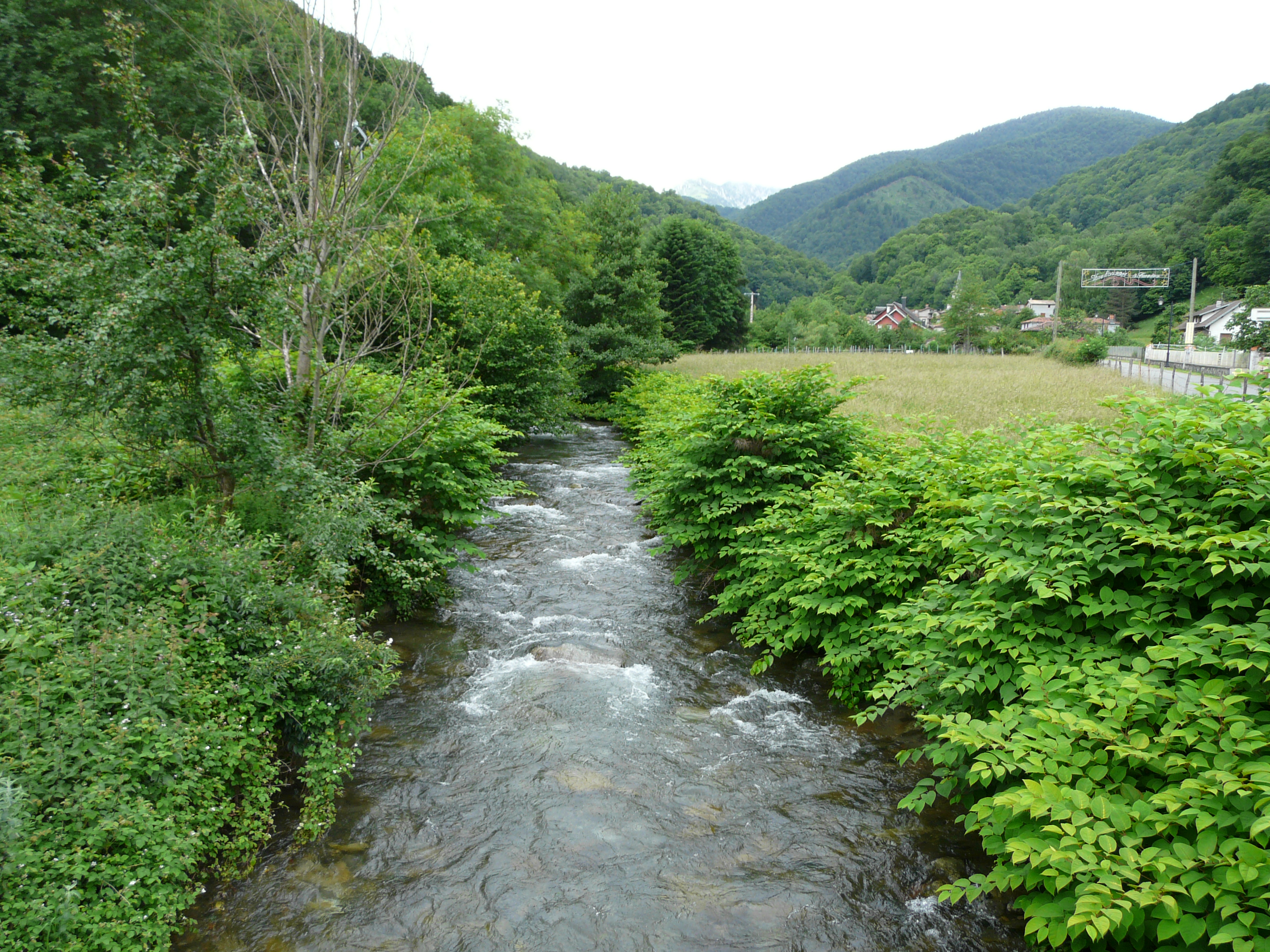 L'Ourse de Ferrère au nord-est du village de Ferrère, Hautes-Pyrénées, France. Vue prise en direction de l'amont.